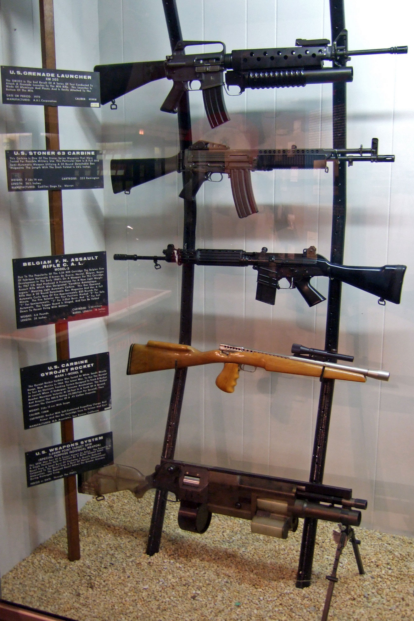 Vietnam-era Western rifles, including M203, Stoner 63, FN CAL, Gyrojet rocket, SPIW.